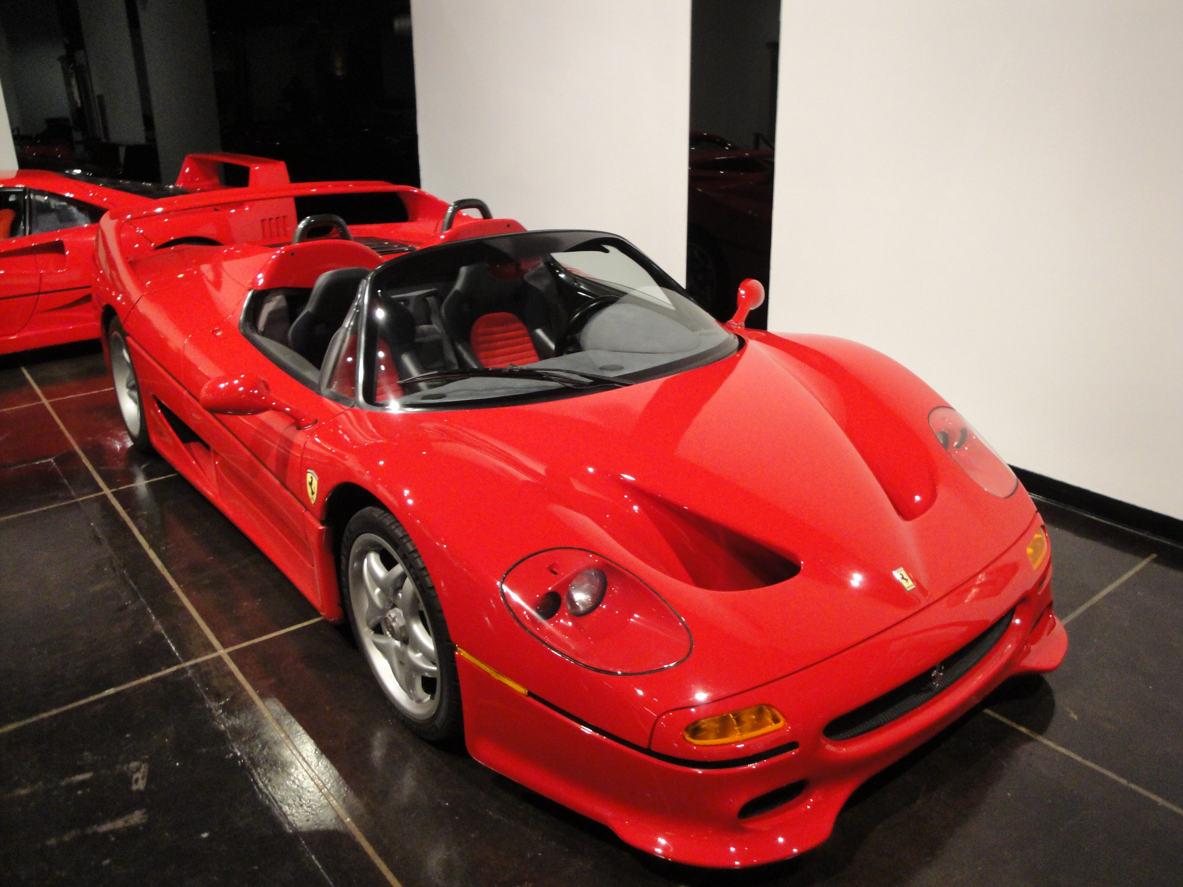 95 Ferrari F-50